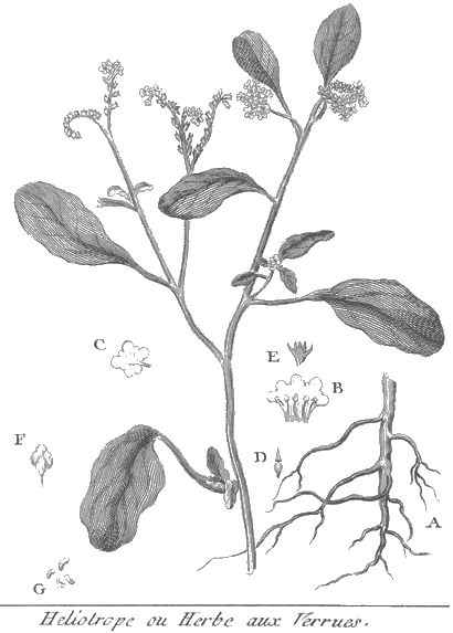 François Rozier, Cours d'agriculture, tome 5, planche 17, héliotrope